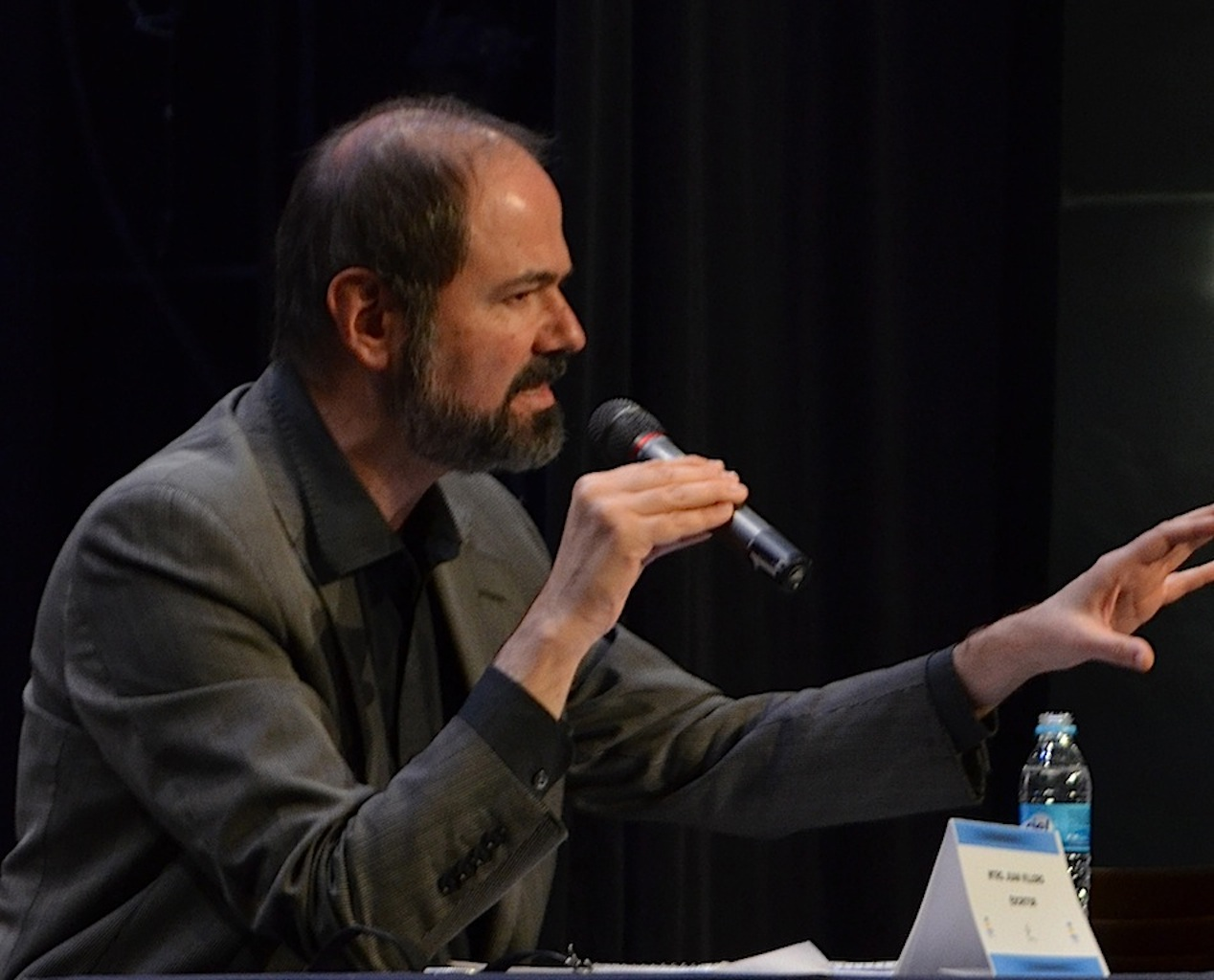 El escritor mexicano Juan Villoro durante la inauguración de la 2da Reunión General de Cronistas del Estado de Puebla.